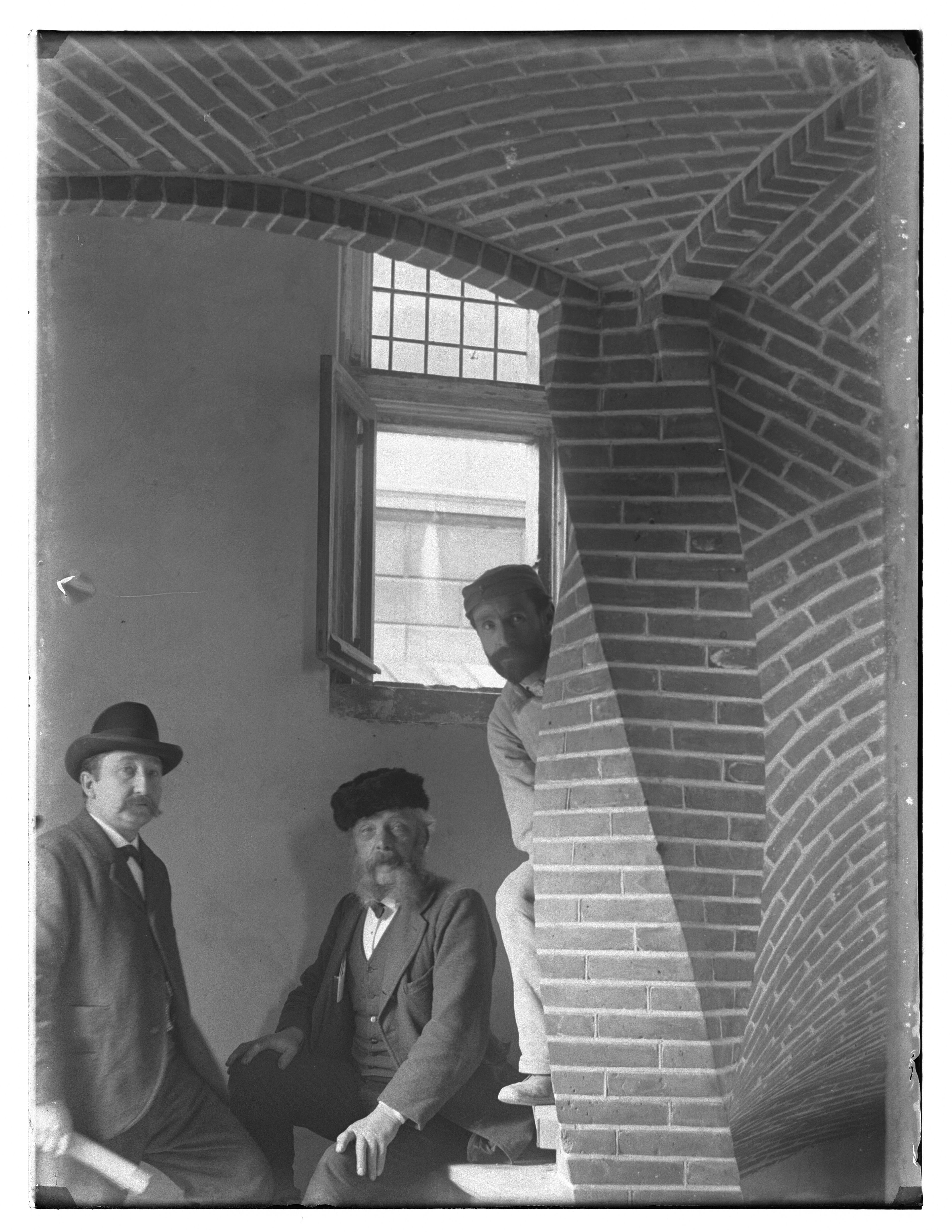 Gemetselde wrongtrap in de zgn. Franekertoren in het nieuwe Fragmentengebouw, afkomstig uit de voormalige Ockingastins. Links is Johan van Tetterode, bouwkundige en medewerker van het bouwbureau van het Rijksmuseum; in het midden is de heer Stokvisch.